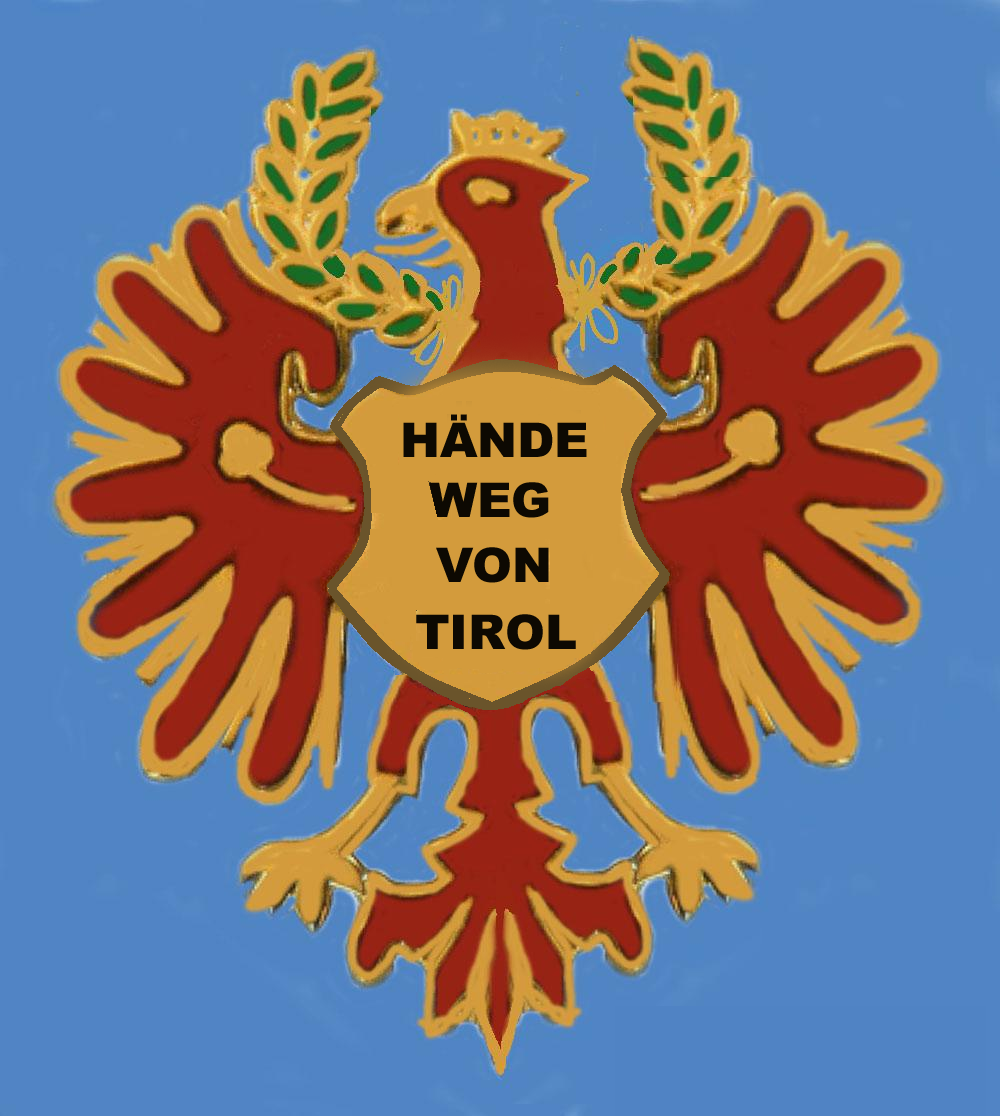 Kappenabzeichen der k.k. Landeschützen. Eingescannt und etwas nachbearbeitet. Entstammt der k.u.k. Adjustierungsvorschrift des österr.ung. Kriegsministeriums Erweiterte Ausgabe von 1915 (Amtliches Werk)